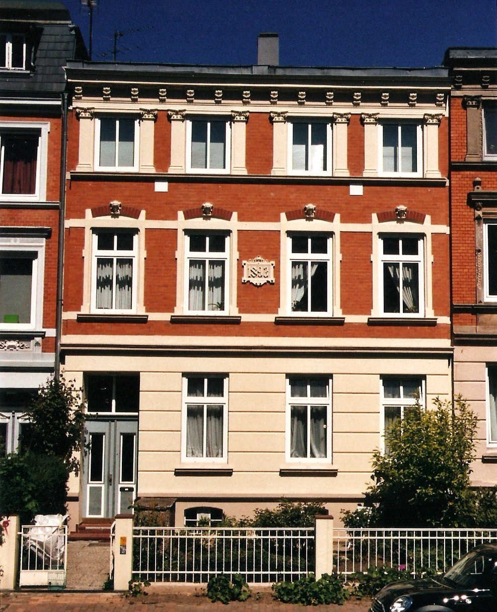 Alterswohnsitz von Johann Gottlob Judersleben